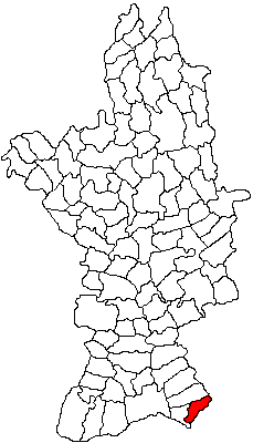 Categorie:Hărţi ale judeţului Olt